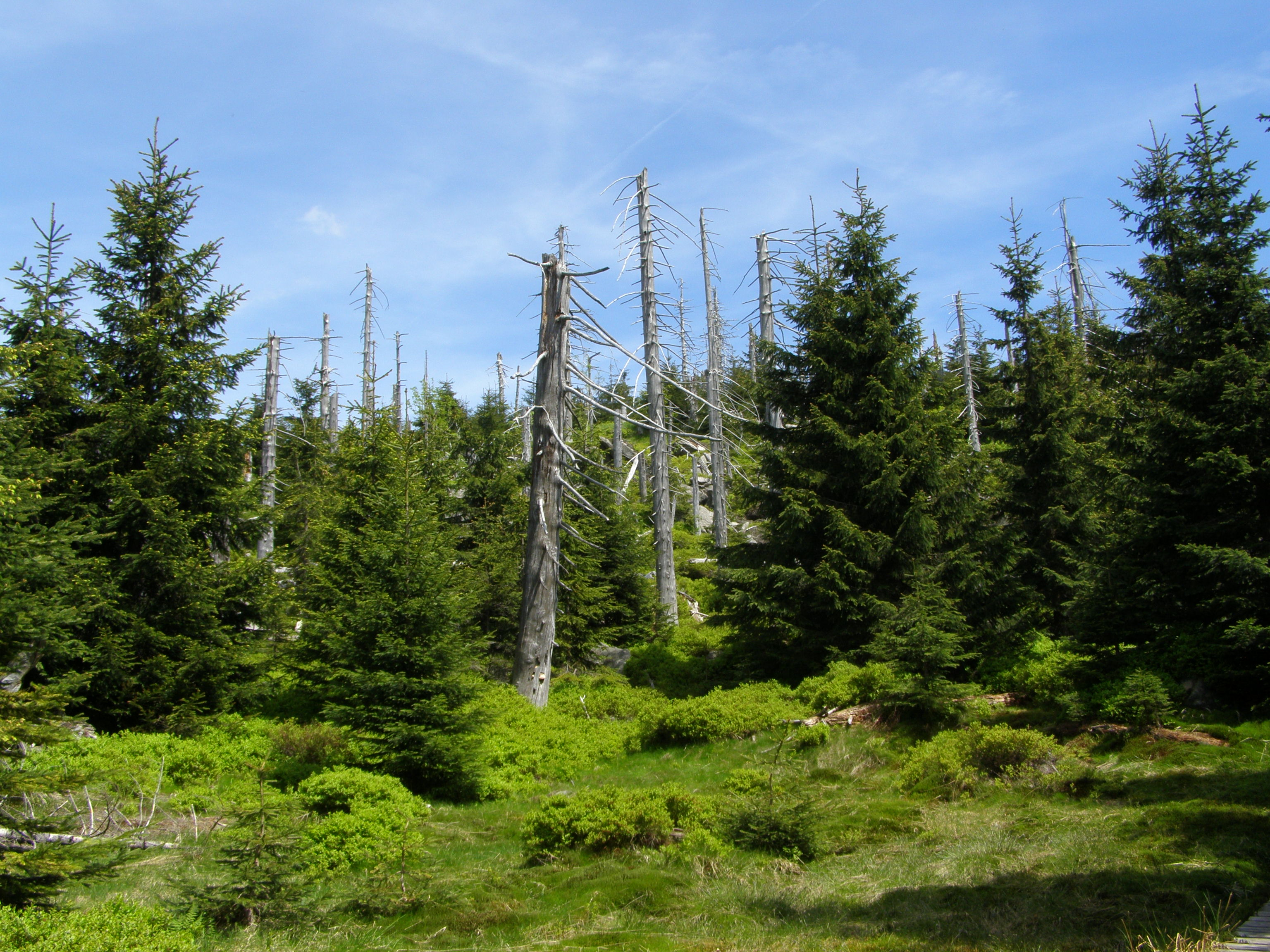 Česky: Jizerské hory, Smědavská hornatina, severozápadní strana vrcholu Jizera (1122 m), Prales Jizera